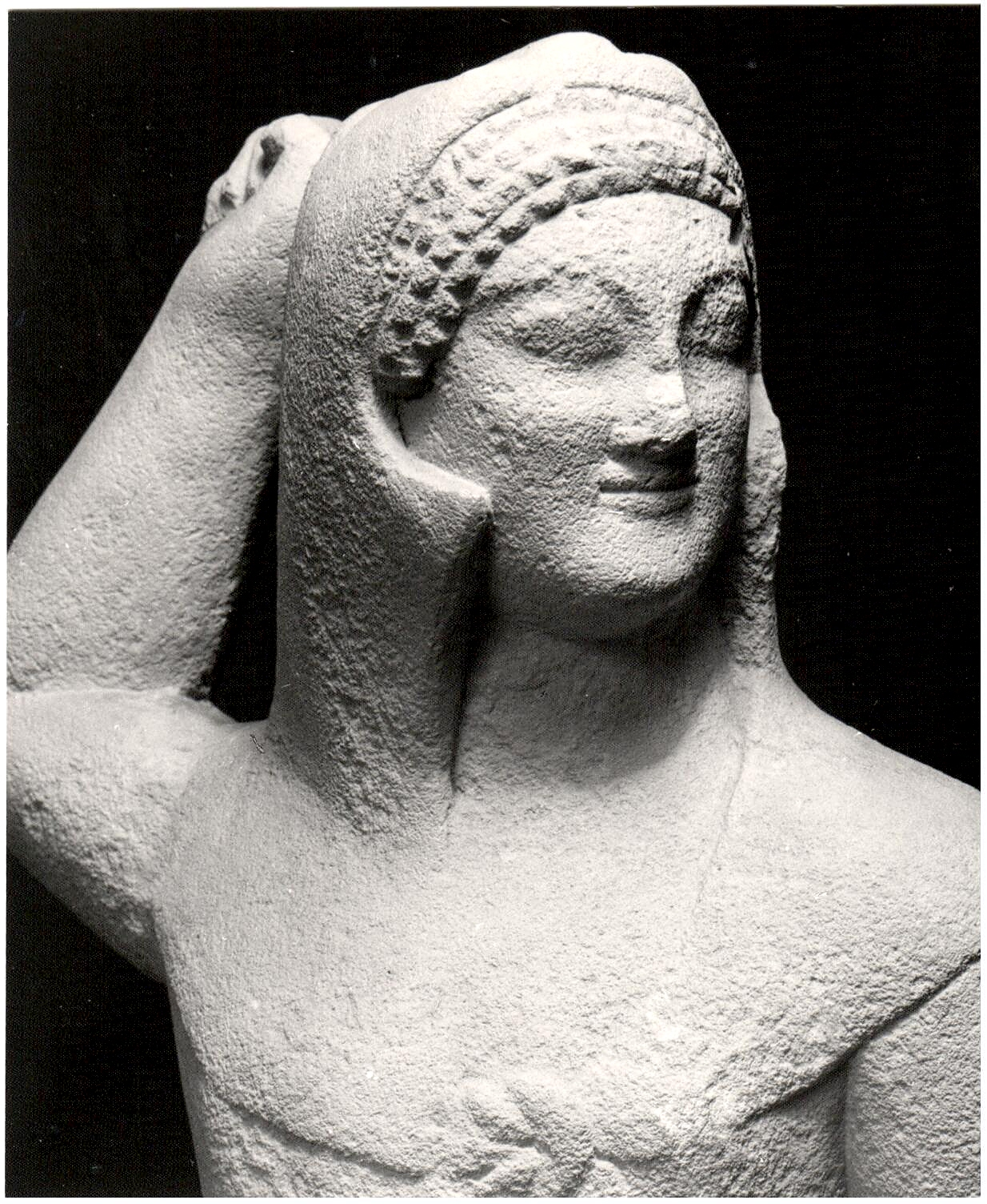 Den cypriotiske guden Melqart-Herakles, statyett i kalksten från Kition. En ung, skägglös gud som svingar sin klubba (nu borta) med höger hand. Han bär lejonskinnet med tassarna knutna över bröstet och lejonets huvud och tänder synliga över pannan. Ca. 450 f.Kr.